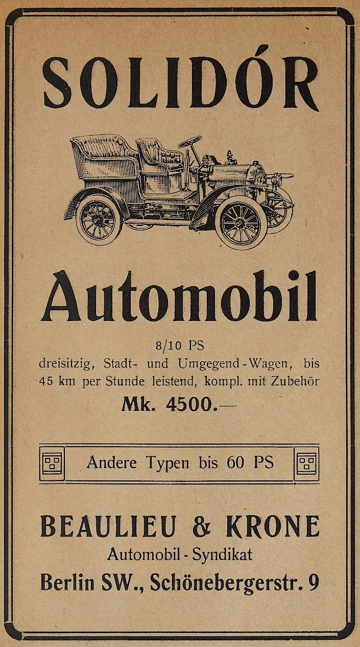 Werbeanzeige für das Solidór Automobil aus Berlin-Kreuzberg, 1907